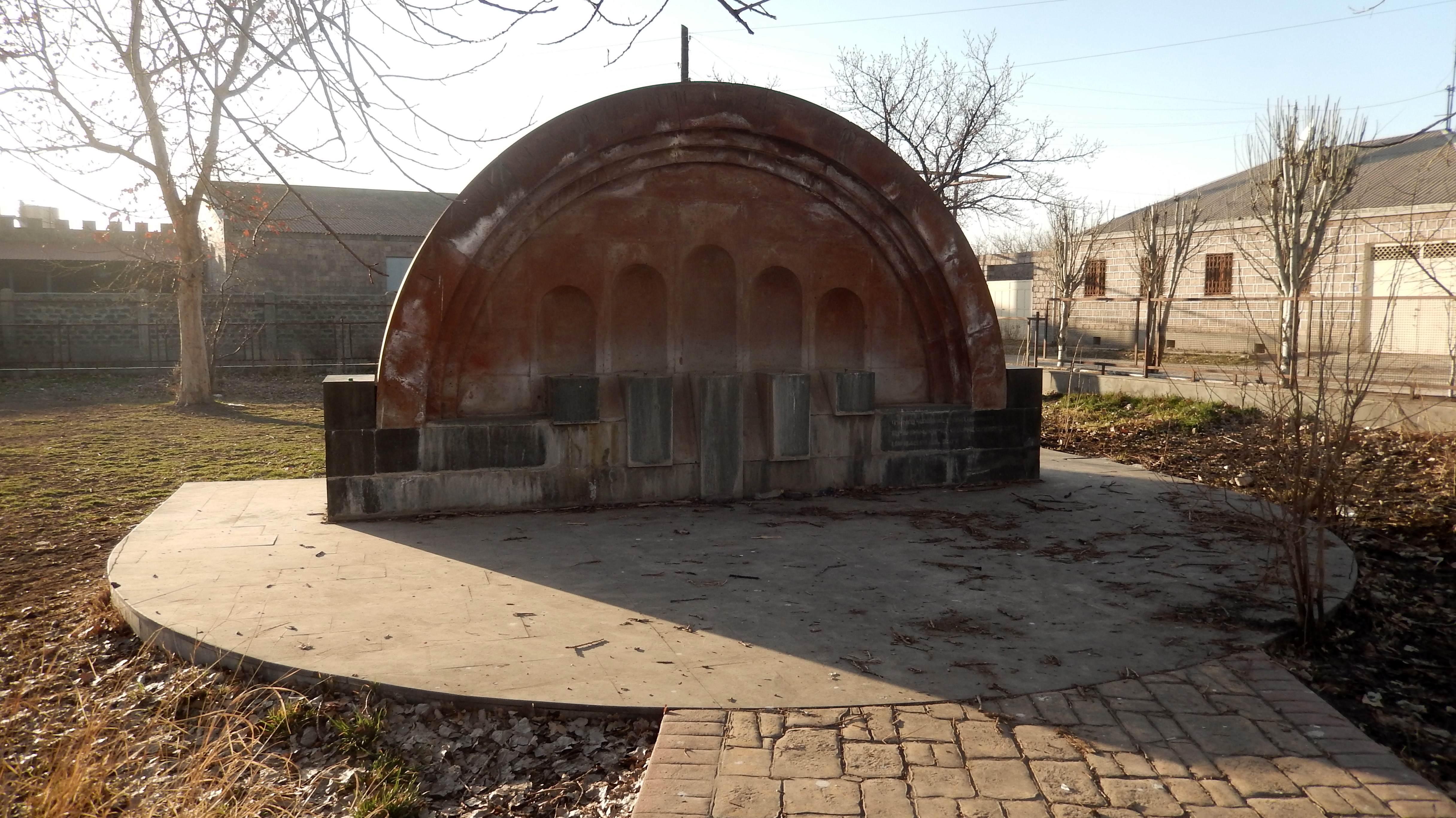 Հուշարձան Երկրորդ աշխարհամարտում զոհվածներին, Այնթապ 12/